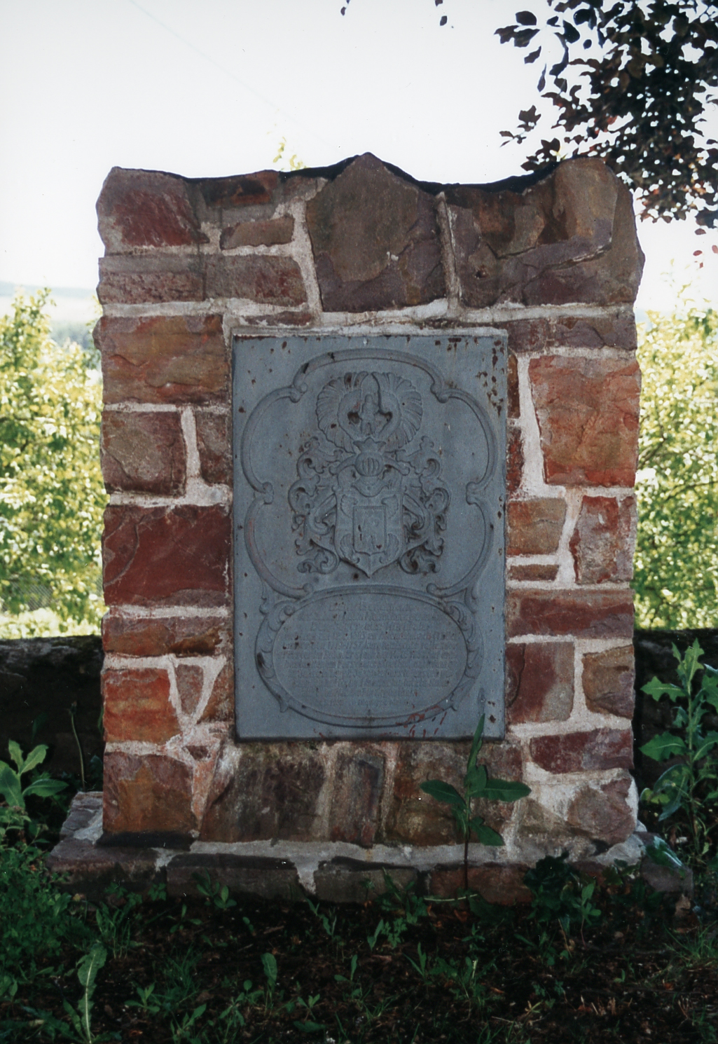 Grabstein des "Jägers aus Kurpfalz" auf dem Argenthaler Friedhof Der Text für die Inschrift des Gedenksteines lautet: Dem Gedenken des Johann Adam Melsheimer genannt "Der Jäger aus Kurpfalz". Geboren am 22.02.1683 zu Altendambach (Thuer.) war er von 1719 - 1757 kurpfälzischer reitender Jäger im Soon. Er starb am 14.8.1757 auf erbbestandenem Forsthaus Struthhof, nachdem er 52 Jahre in kurpf. Jäger- und Forstdiensten gestanden hatte, und fand seine letzte Ruhe auf dem Friedhof zu ArgenthaI. Die Sippe Melsheimer.